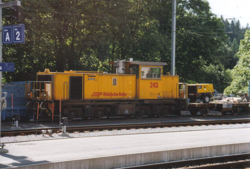 Gmf 4/4 242 am 21. Juni 2003 in Klosters-Platz.